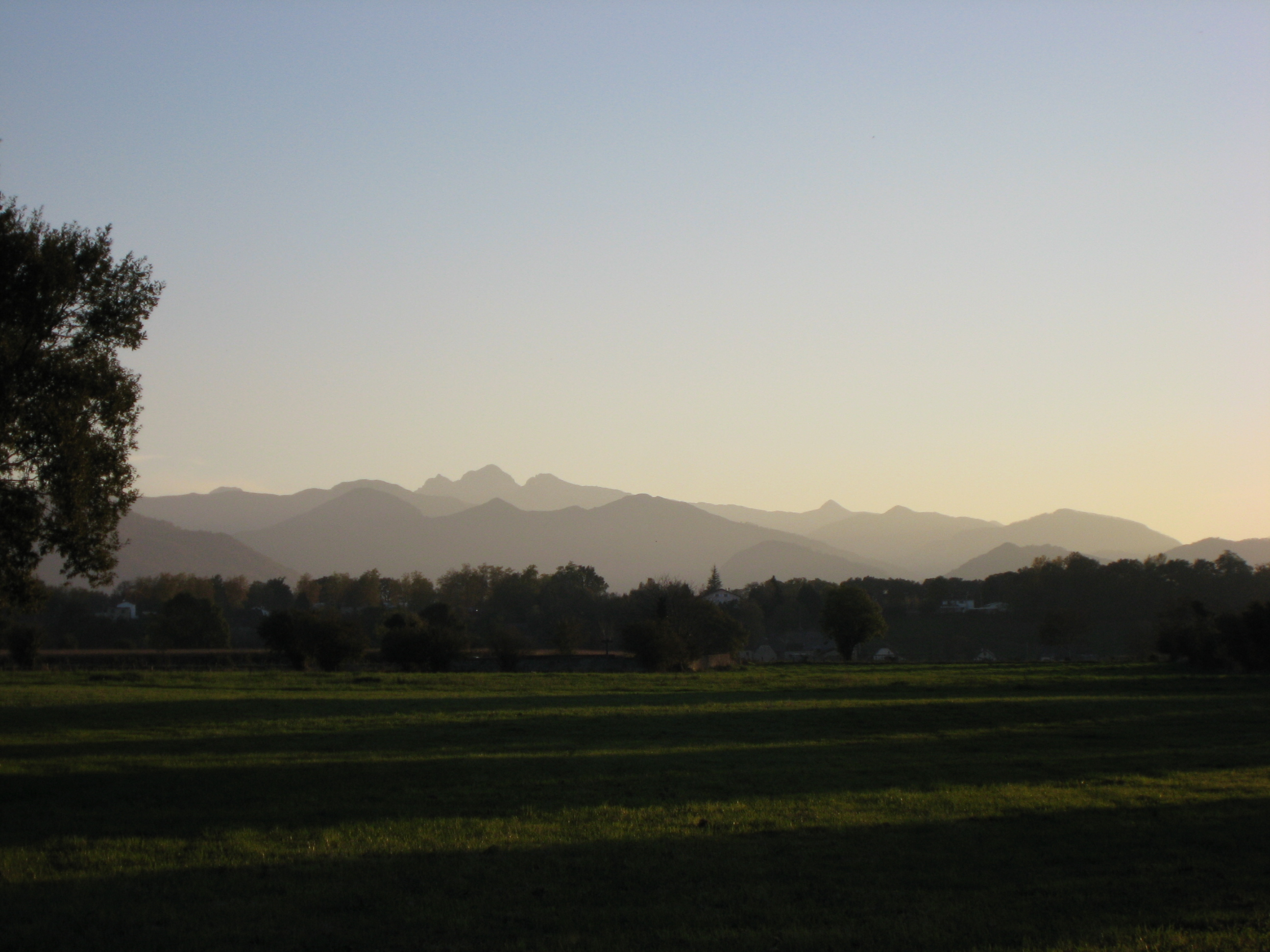 Vue de la chaîne des Pyrénées depuis le village d'Escou (Pyrénées Atlantiques) Pyrénées).